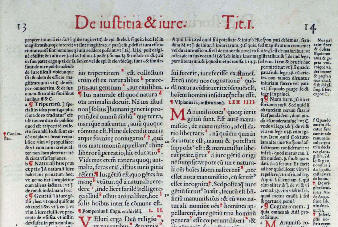 Frammento del Digesto.